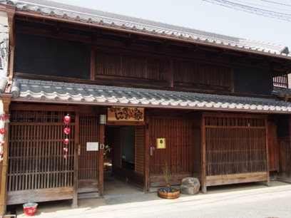 ならまちにぎわいの家